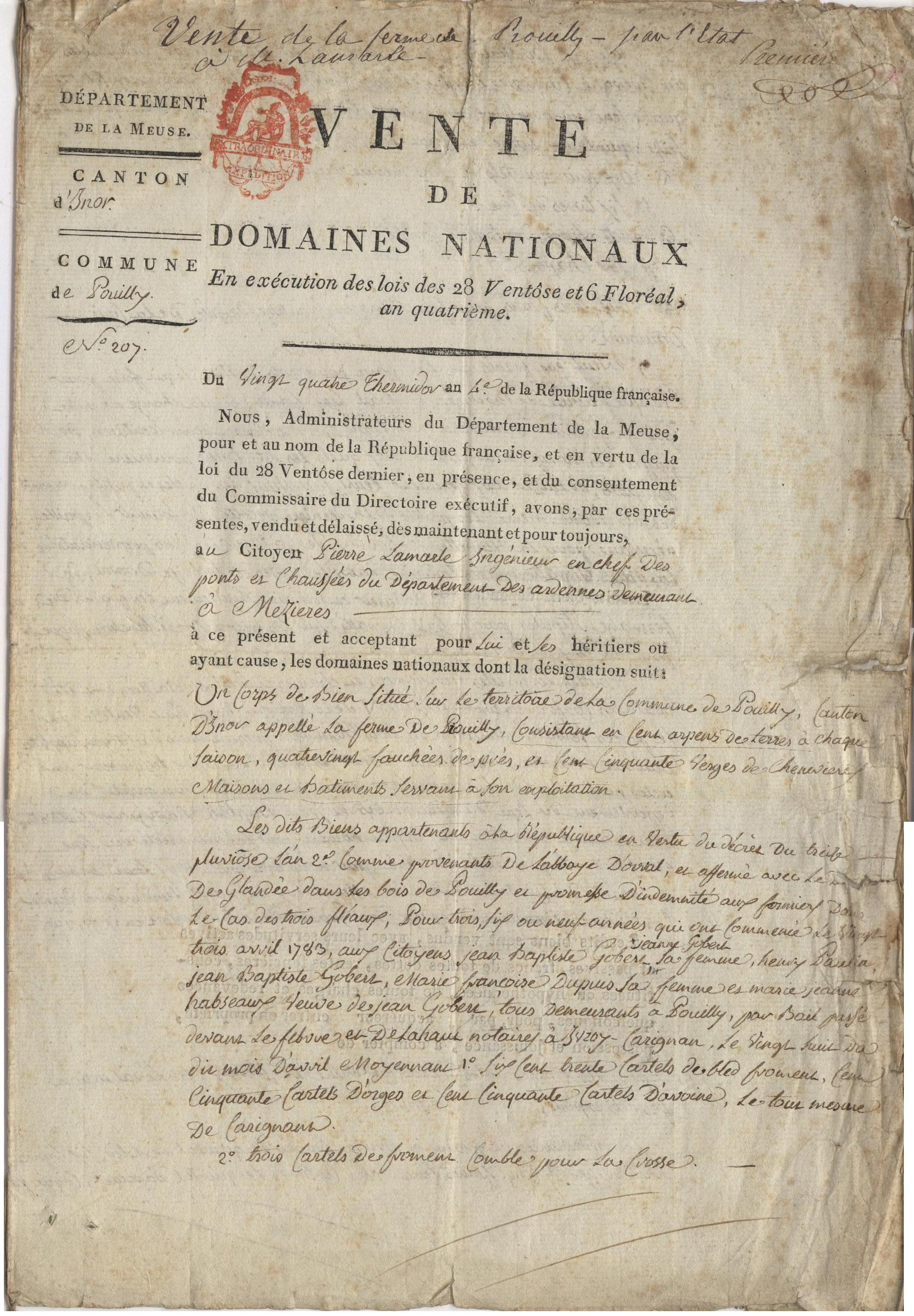 Exemple de vente de Biens Nationaux sur les lois des 28 Ventôse et 6 Floréal An 4, l'acte concerne la commune de Pouilly-sur-Marne par le notaire de Carignan; issues de la bibliothèque personnelle.